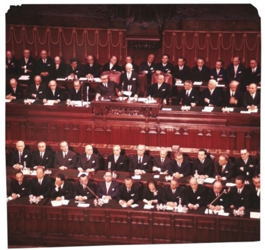 Giuramento del nuovo Capo dello Stato Antonio Segni